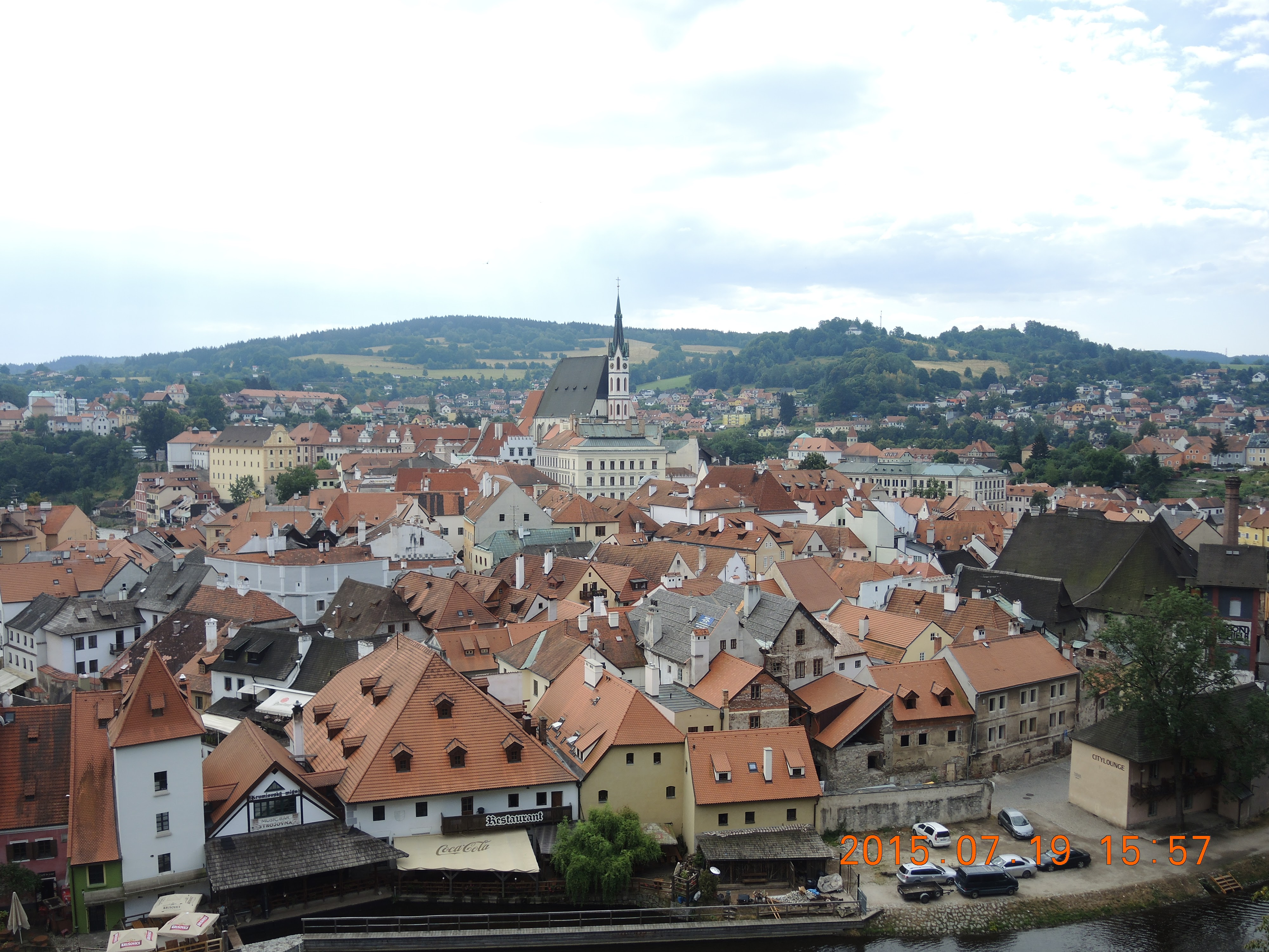 中文（台灣）: 捷克庫倫洛夫